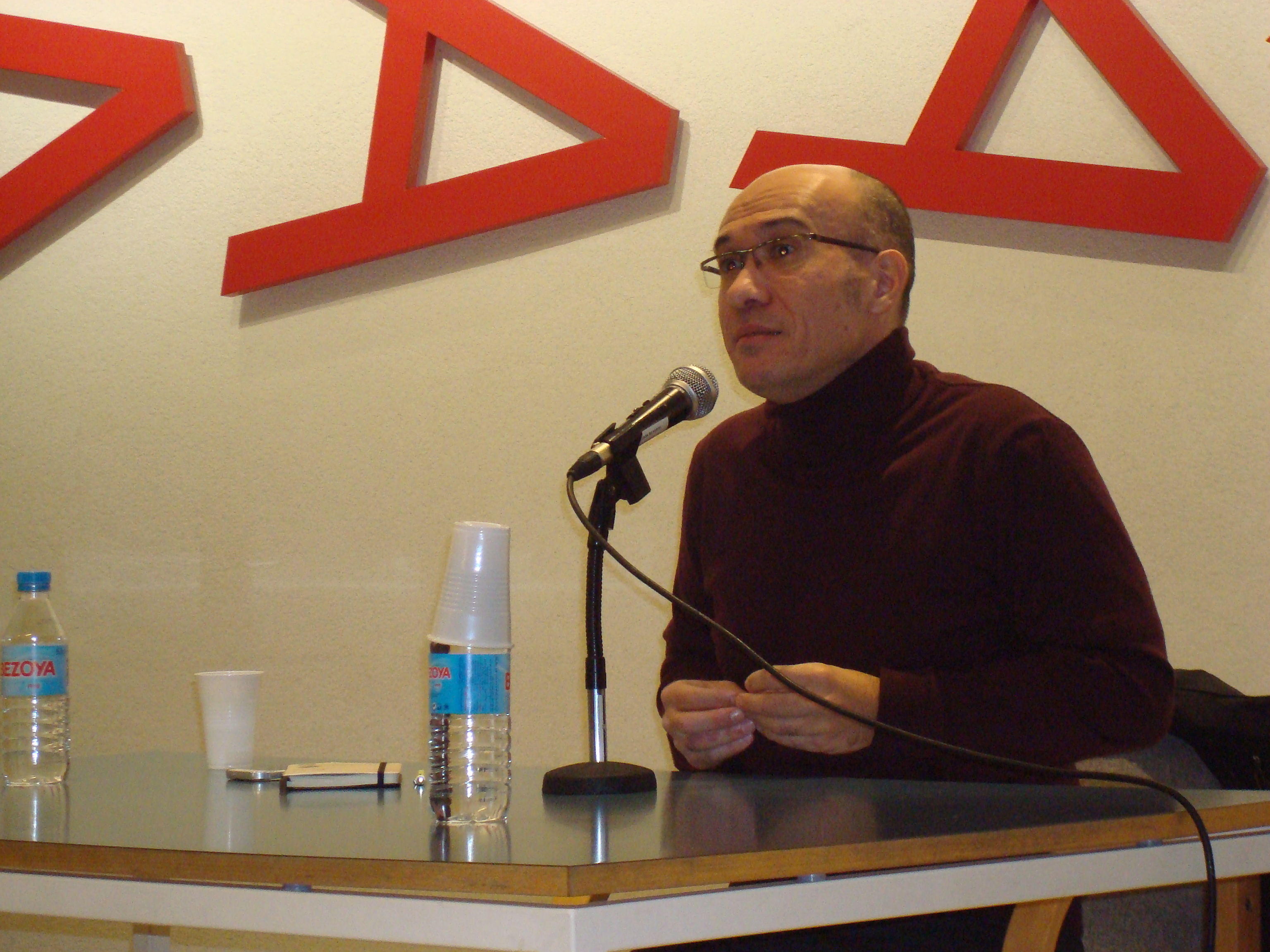 L'escriptor i periodista Gaspar Hernández a la Biblioteca Santa Oliva d'Olesa de Montserrat el gener de 2014.